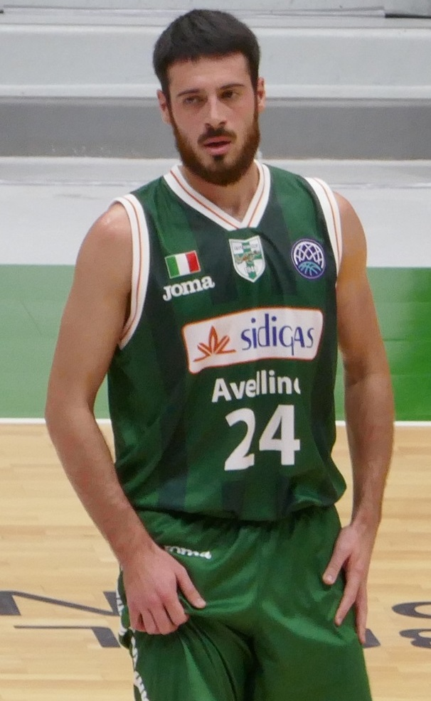 Lorenzo D'Ercole